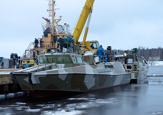 Спуск на воду двух патрульных катеров «Раптор» (проект 03160), строительные номера 709 и 710